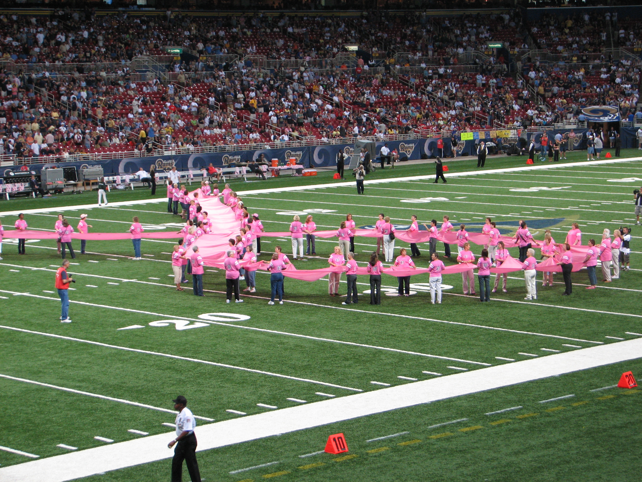 100 נשים ששרדו את מחלת סרטן השד נושאות סרט ורוד ענק ויוצרות את הסמליל למאבק בסרטן השד. האירוע התקיים בהפסקת משחק הפוטבול בין סנט לואיס ראמס ואריזונה קרדינלס ב-7 באוקטובר 2007.